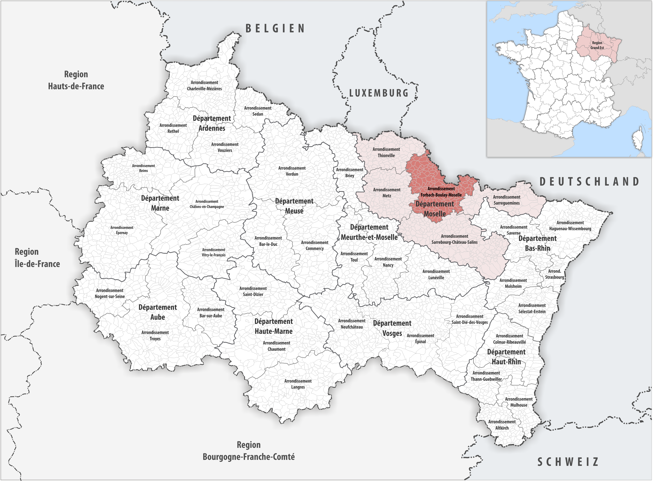 Lage des Arrondissements Forbach-Boulay-Moselle